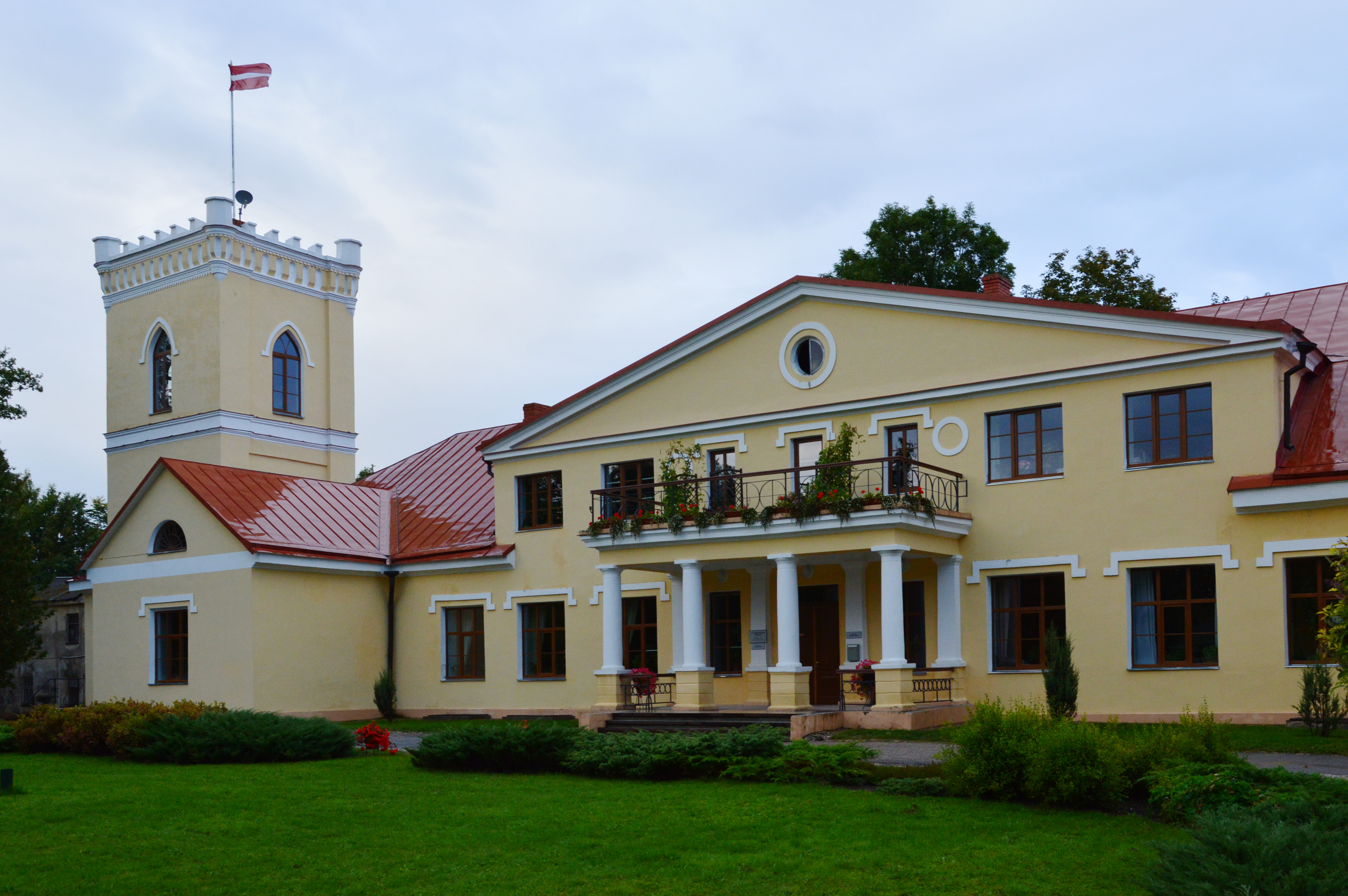 Dzērbene mõisa peahoone